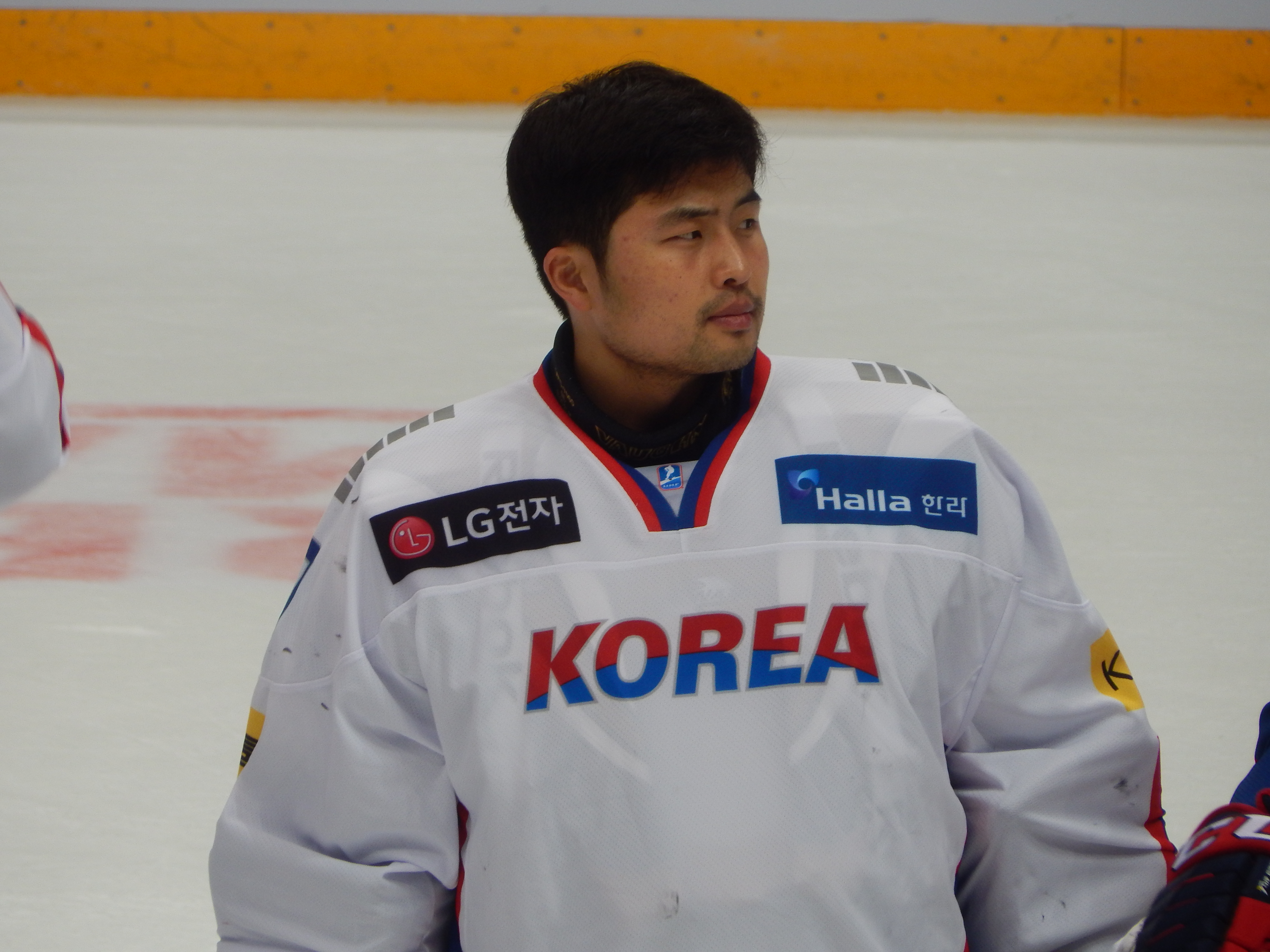 Кубок Первого Канала 2017, матч Финляндия - Южная Корея (15 декабря 2017) 50 PARK,Sung Je